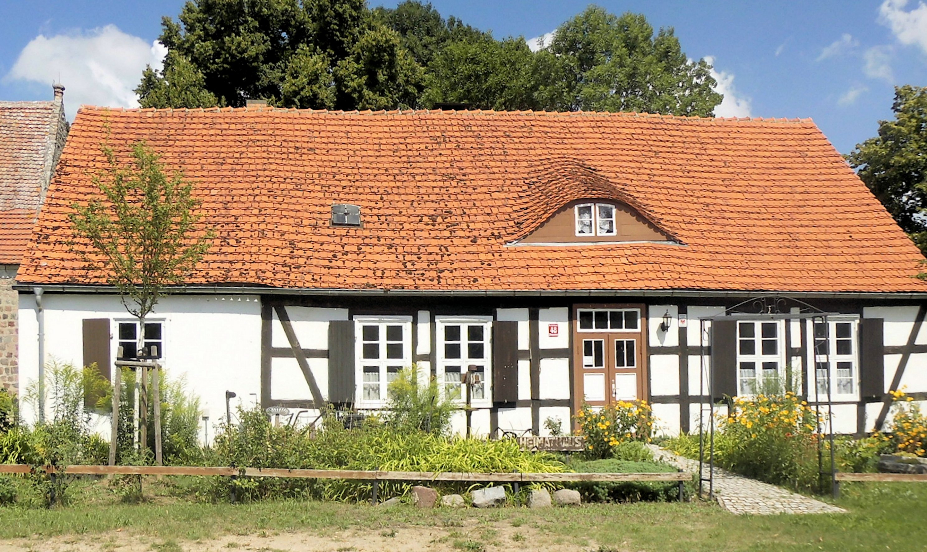 denkmalgeschütztes ehemaliges Schul- und Küsterhaus in Schönermark, Gemeinde Mark Landin (Uckermark)